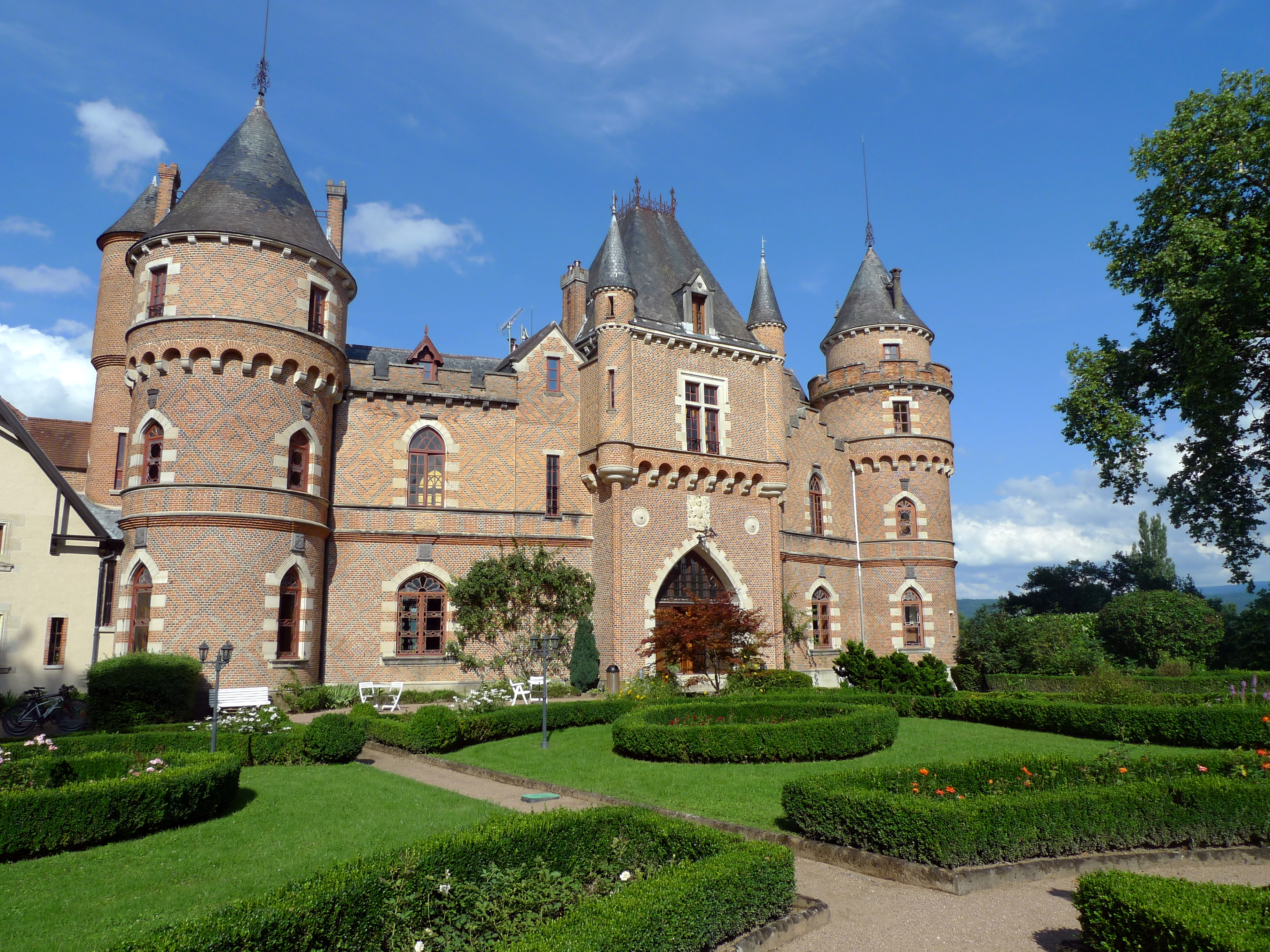 Le château de Maulmont à Saint-Priest-Bramefant, Puy-de-Dôme